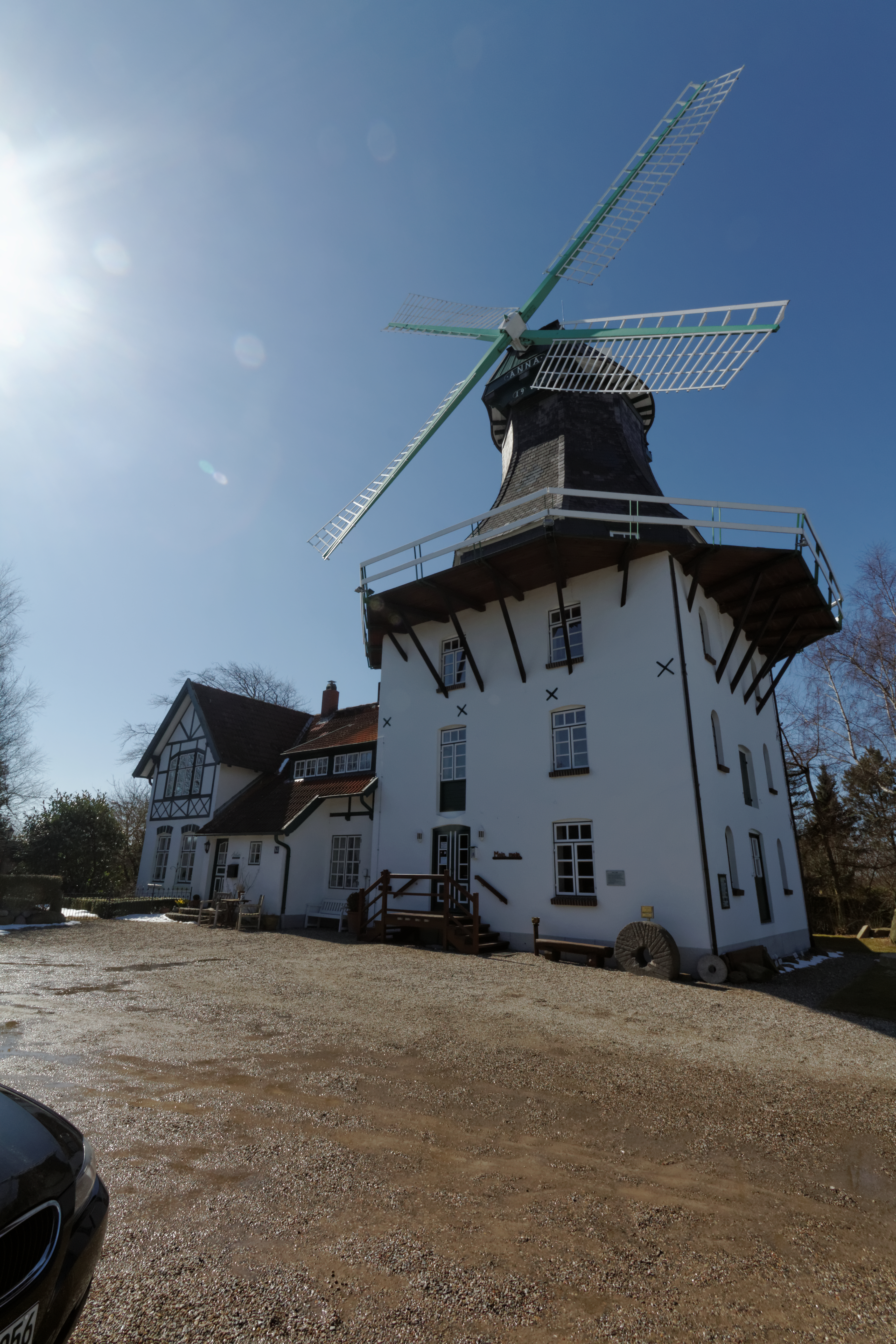 Rieseby_Norby, Windmühle "Anna"